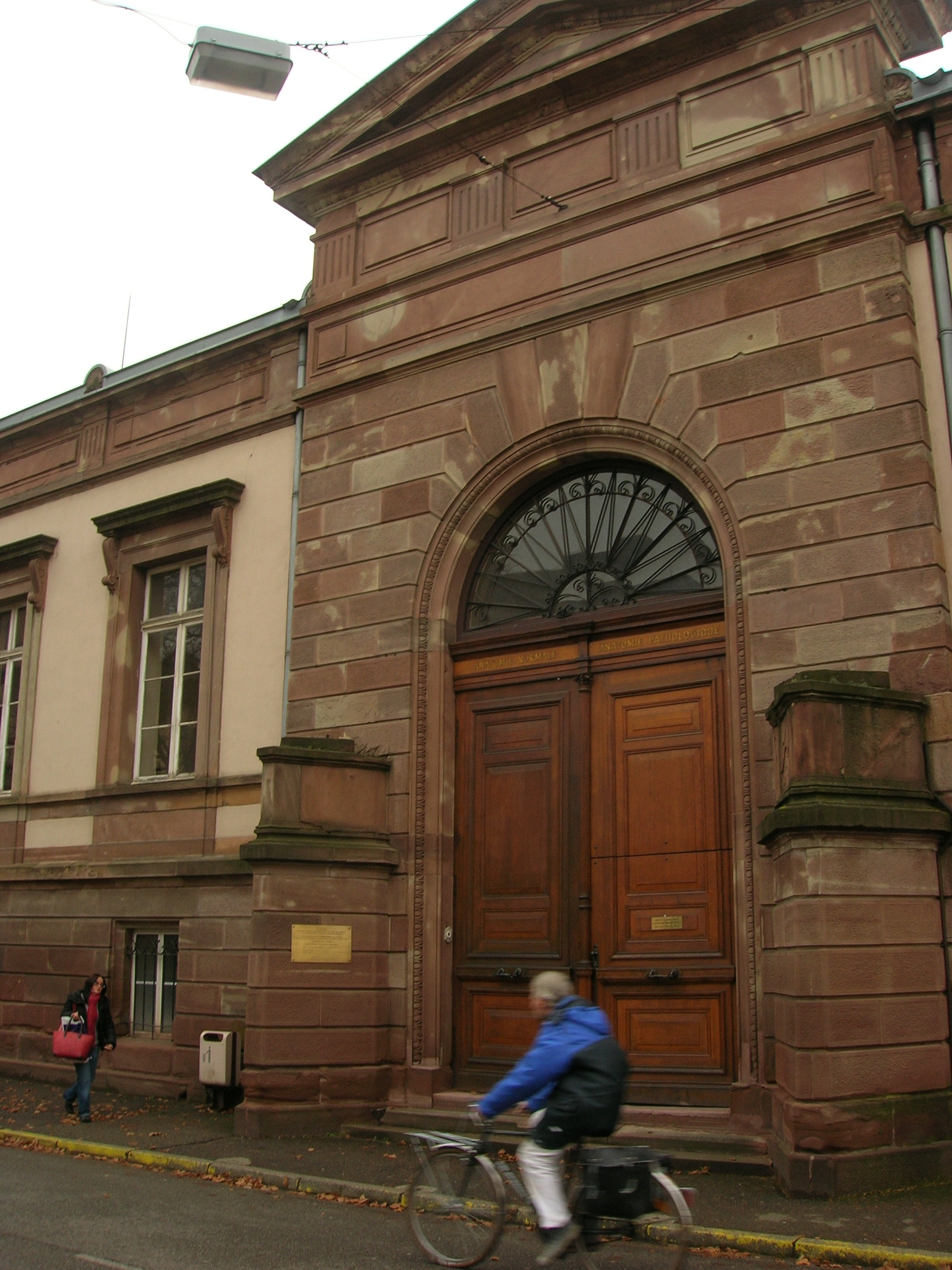 Entrée principale de l'Institut d'anatomie de Strasbourg